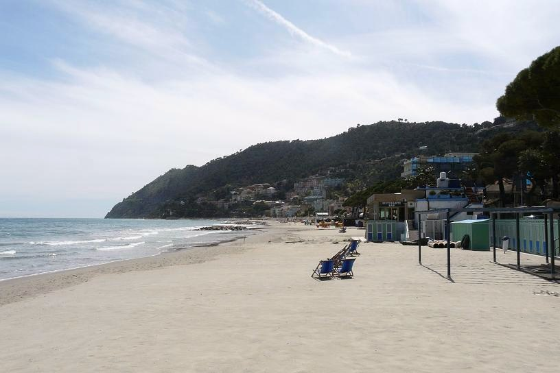 Foto varie di Laigueglia, Liguria, Italia